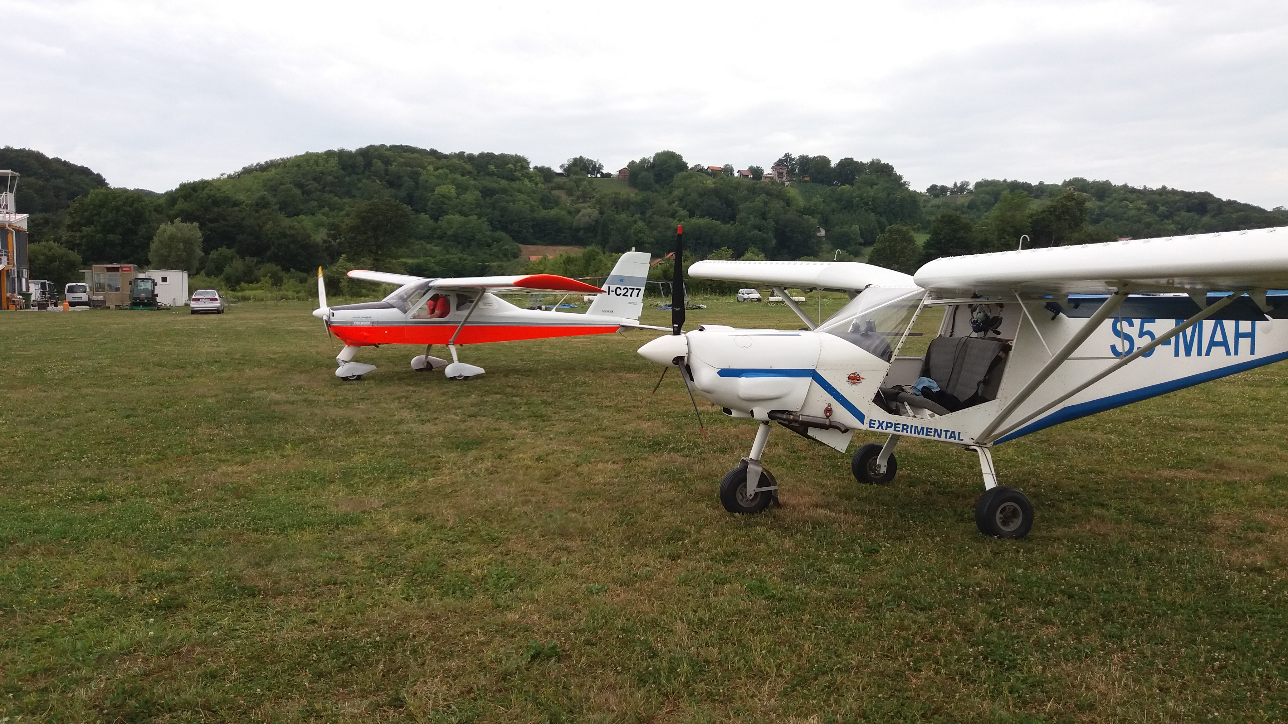 S5-MAH